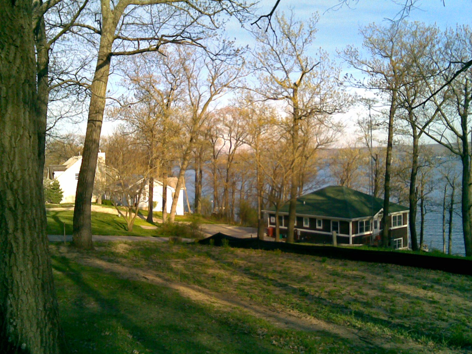 WilliamBayMay